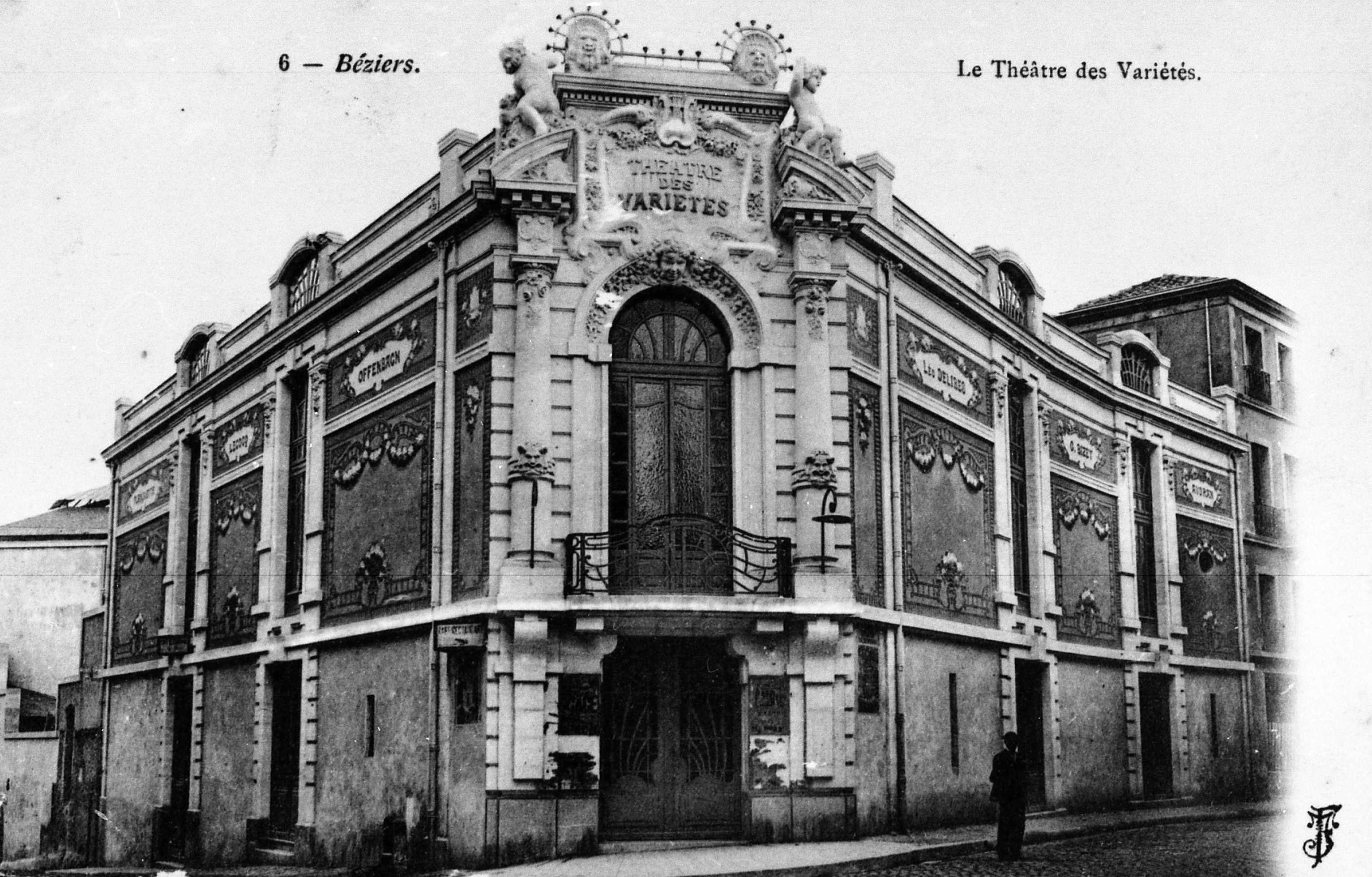 Le Théâtre des Variétés, rue Victor-Hugo, à Béziers (Hérault).